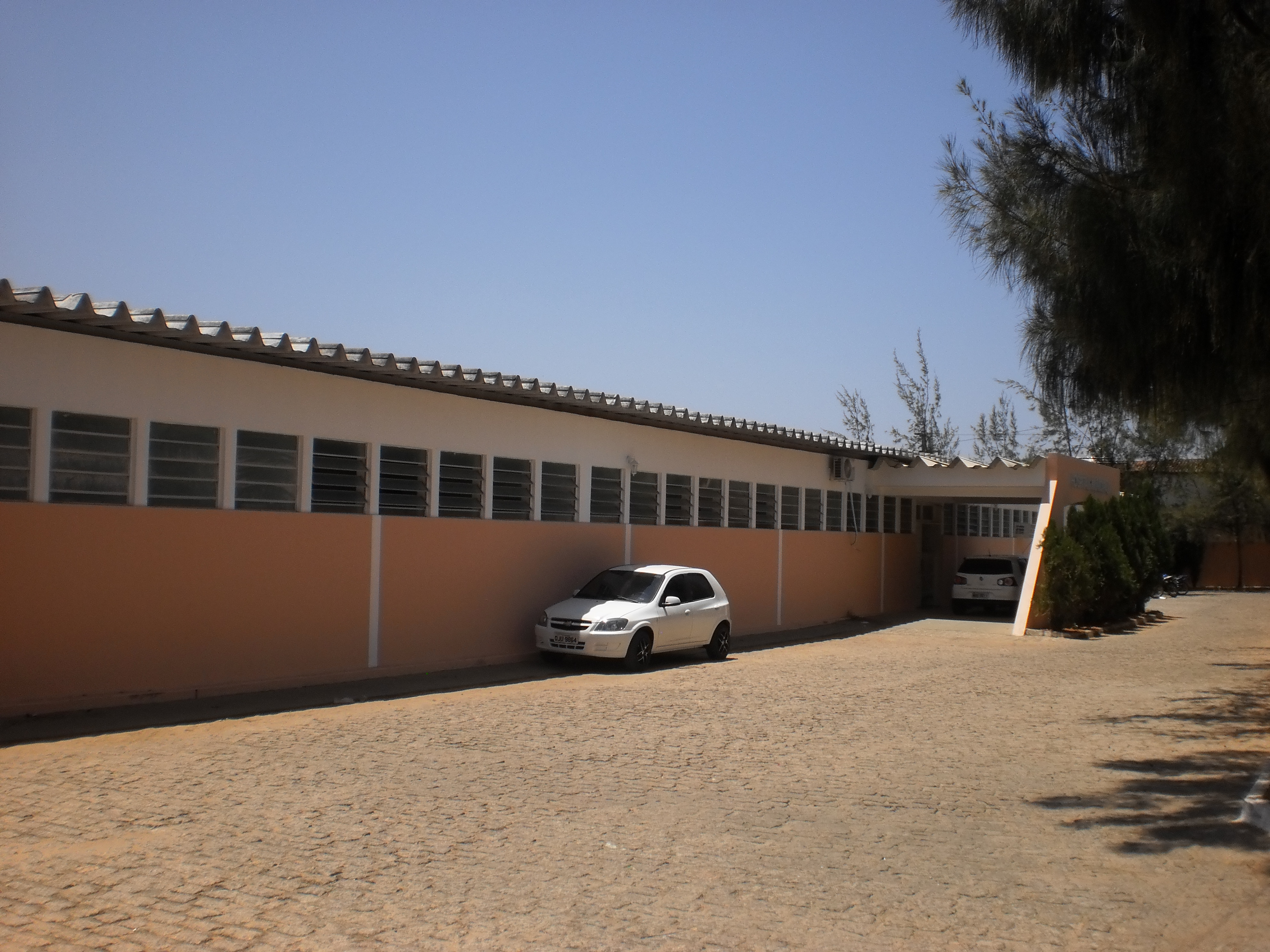 Hospital Municipal "Áurea Maia de Figueiredo" - São Miguel, Rio Grande do Norte, Brasil.